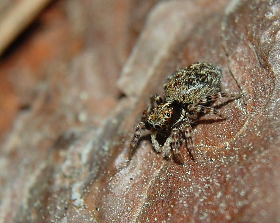 Pseudeuophrys erratica, female